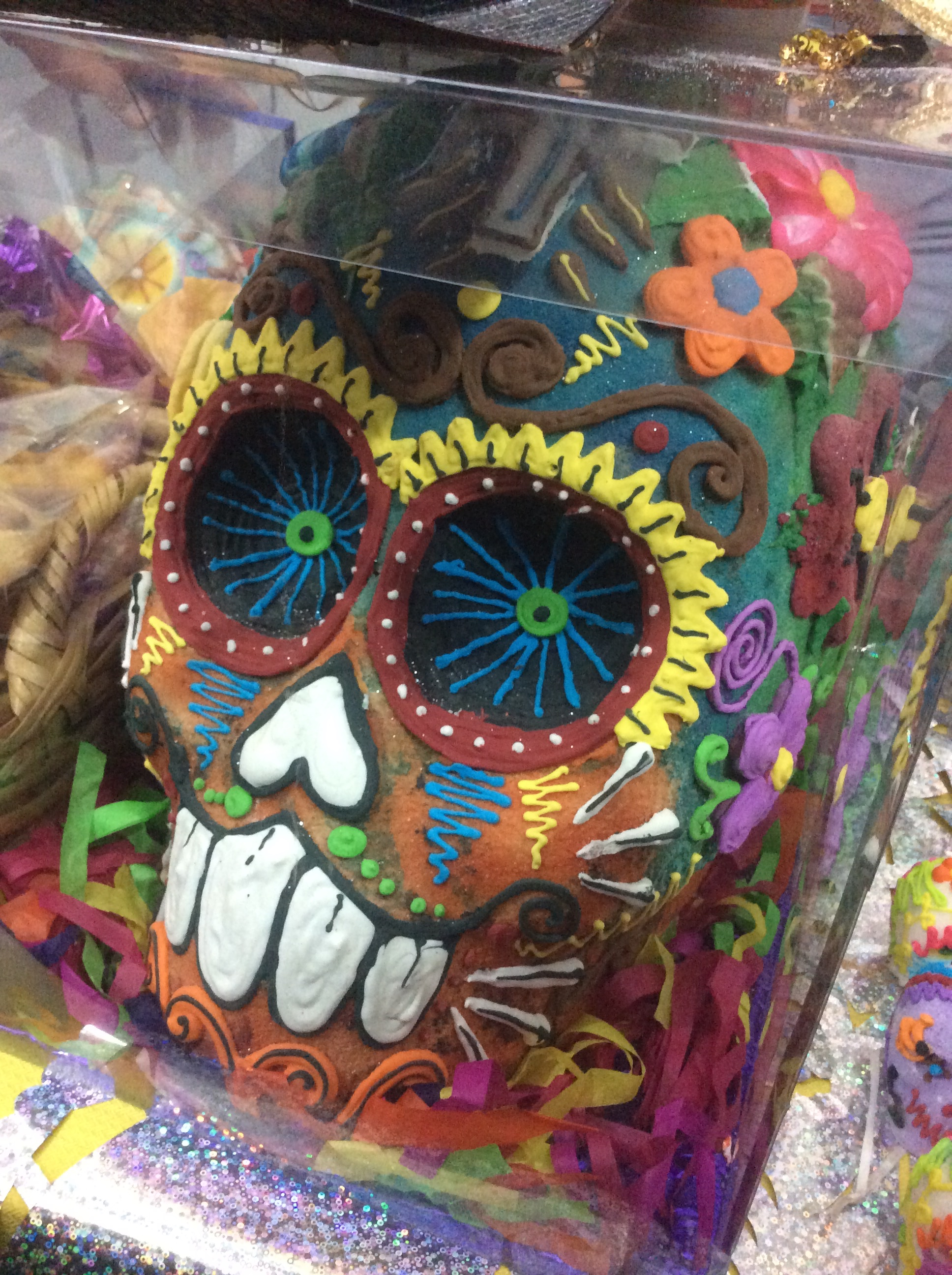 Calavera de azúcar decorada para el día de muertos en Coyoacán, México D.F.